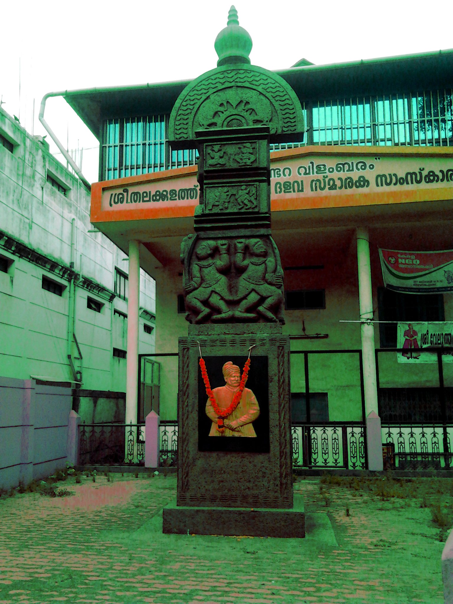 കുണ്ടറ വിളമ്പര സ്മാരകം